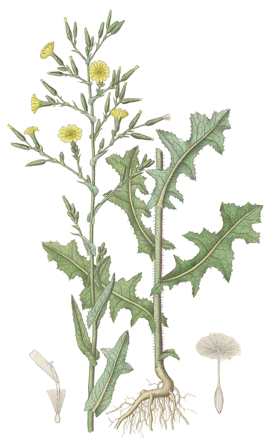 Illustration of Lactuca Scariola Linné = Lactuca serriola